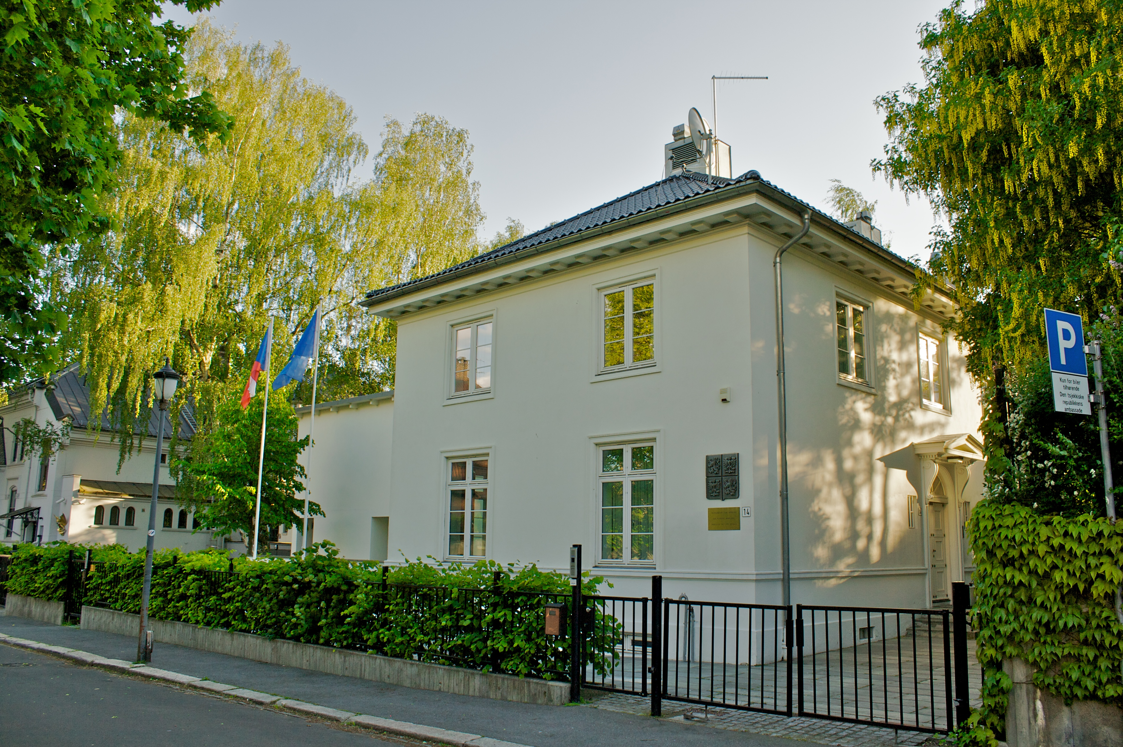 Tsjekkias ambassade i Fritzners gate 14 på Gimle i Oslo.